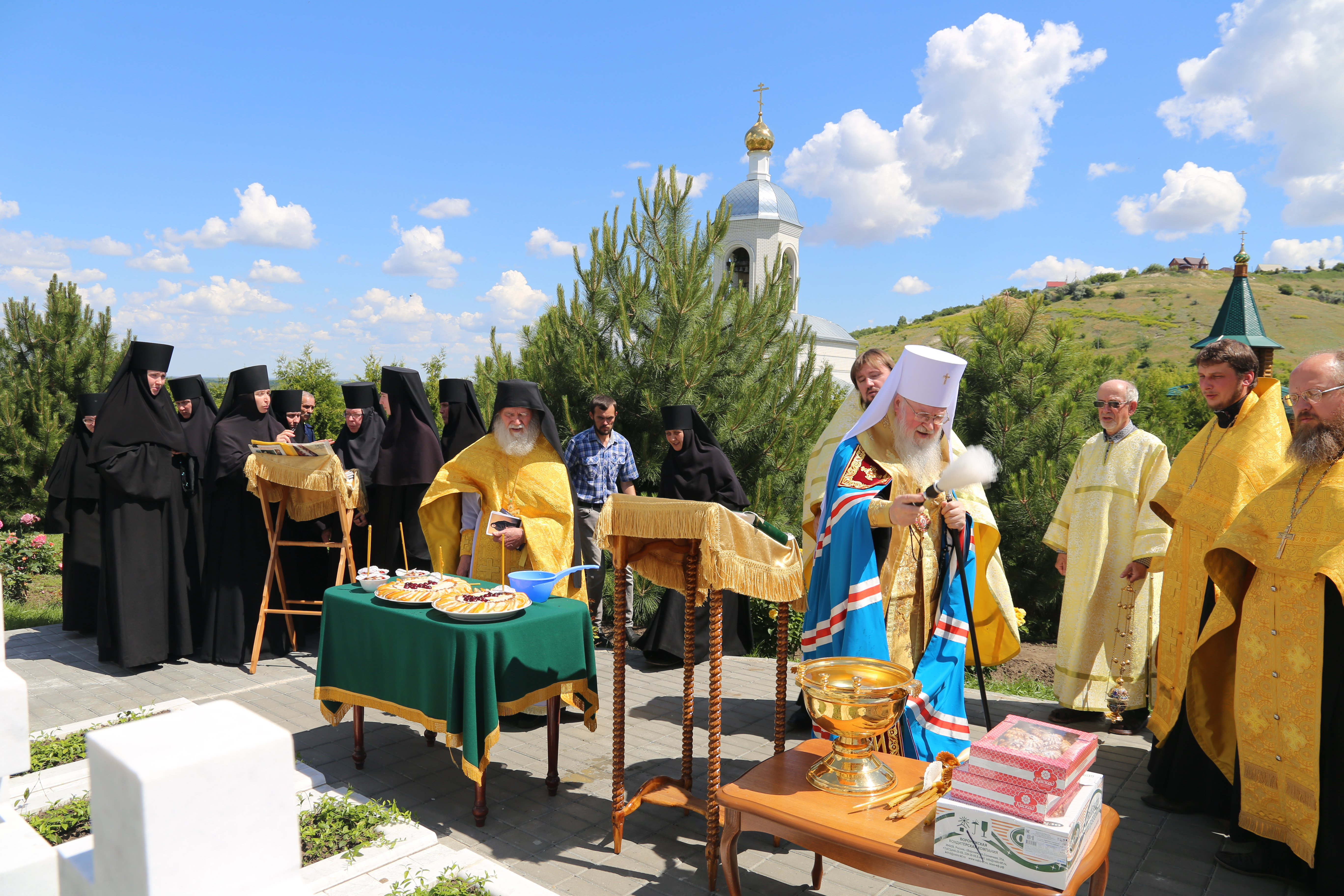 Митрополит Владимирский и Суздальский Евлогий (Смирнов) совершает панихиду по монахине Раисе (Кривошлыковой) 19.06.2017